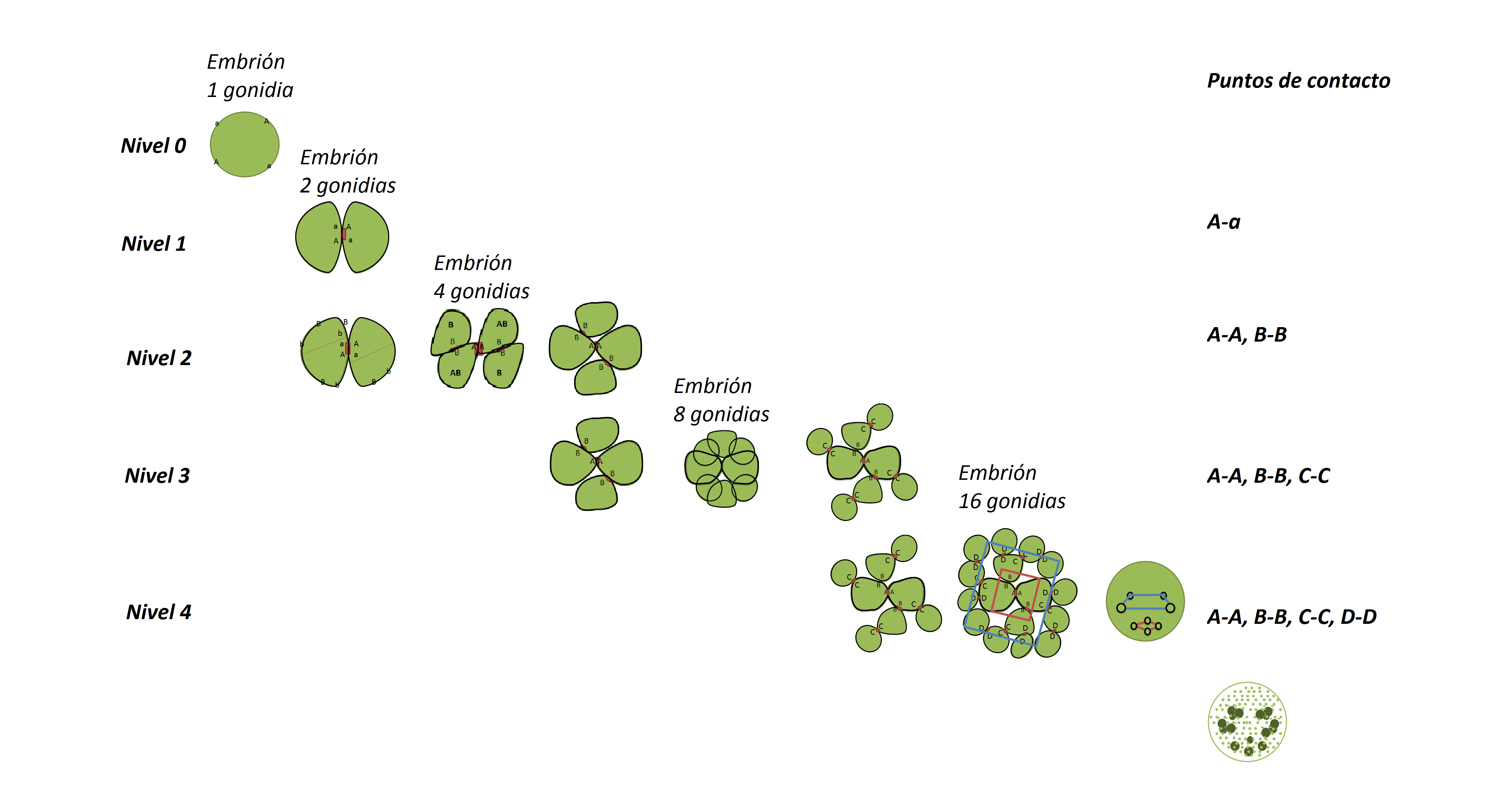 Diferentes niveles en la embriogénesis de Volvox carteri. Gonidias en el proceso de División. Adaptada de Sumper(1982)